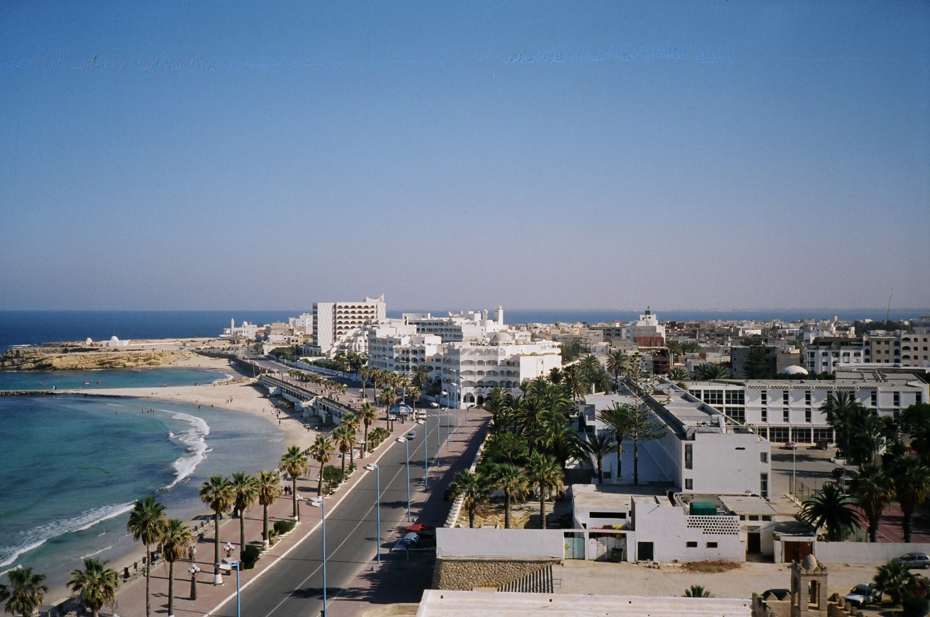 Corniche de la ville de Monastir, Tunisie